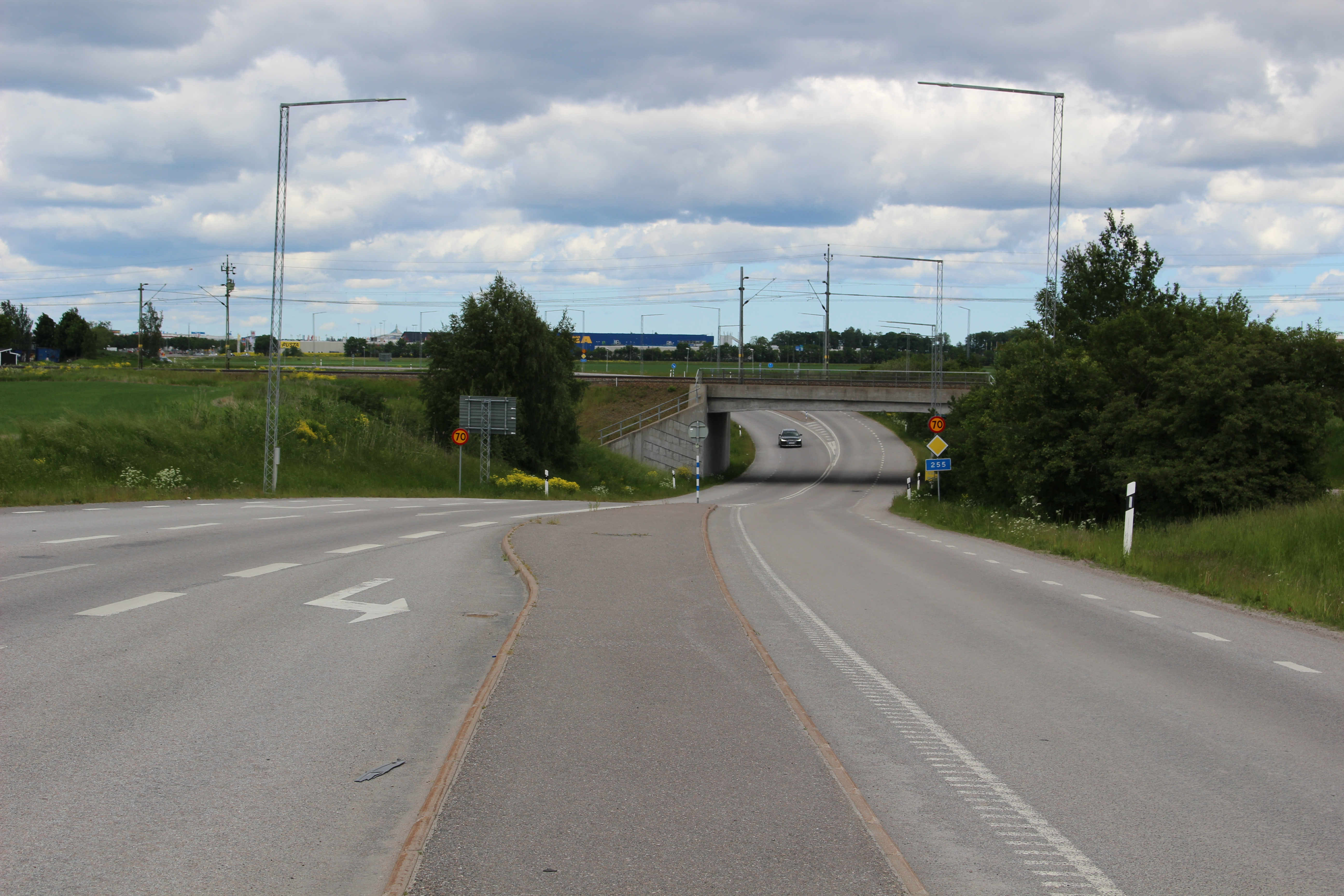 Länsväg 255 mellan Sävja och Uppsala